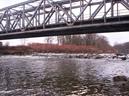 Železniční most přes státní hranici v Chałupkách